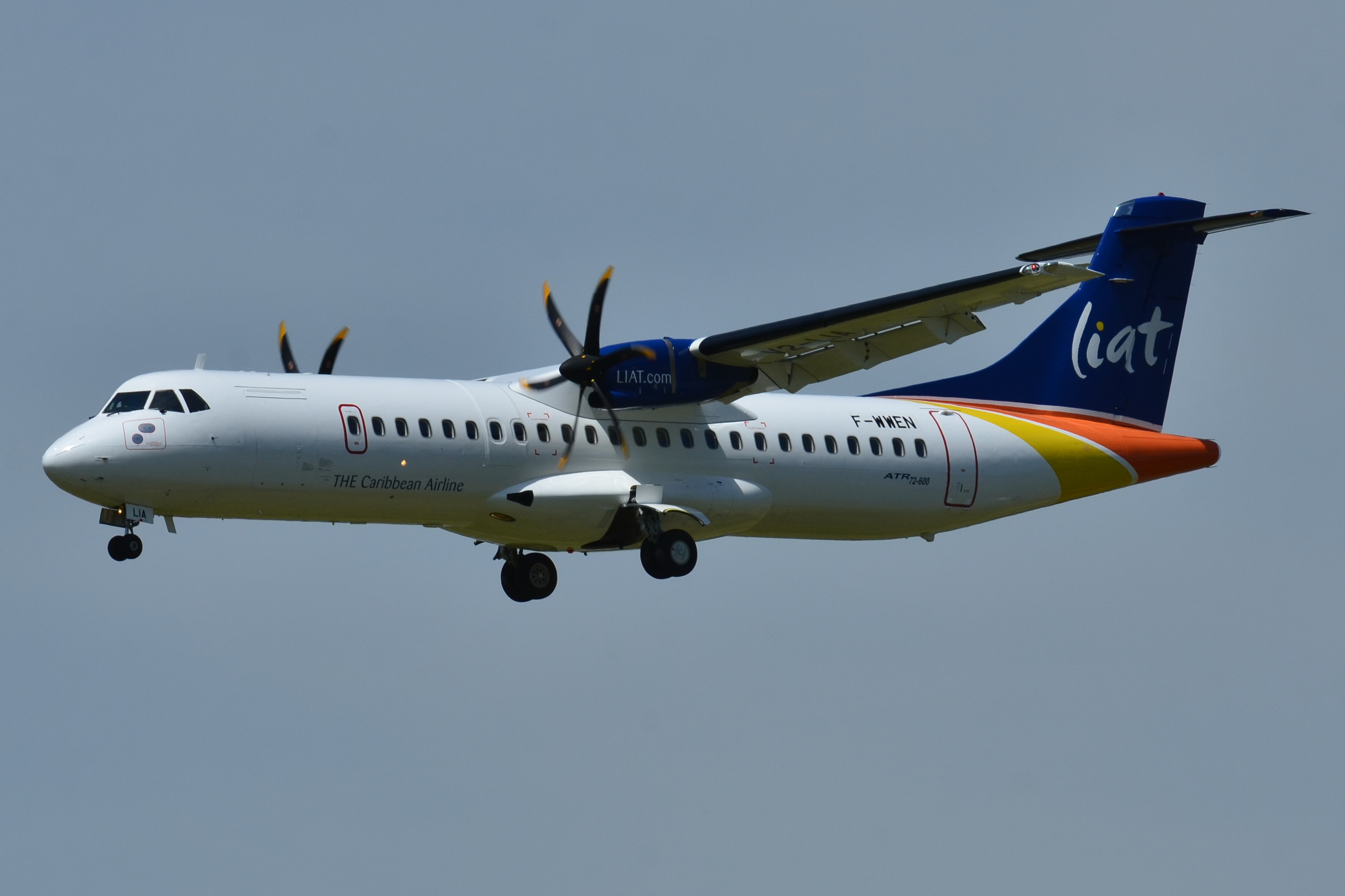 Photo prise à l'aéroport de Toulouse-Blagnac (LFBO) en France. Picture take at Toulouse-Blagnac Airport (LFBO) in France.